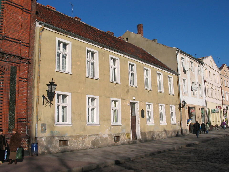 Geburtshaus Raszeja in Chelmno